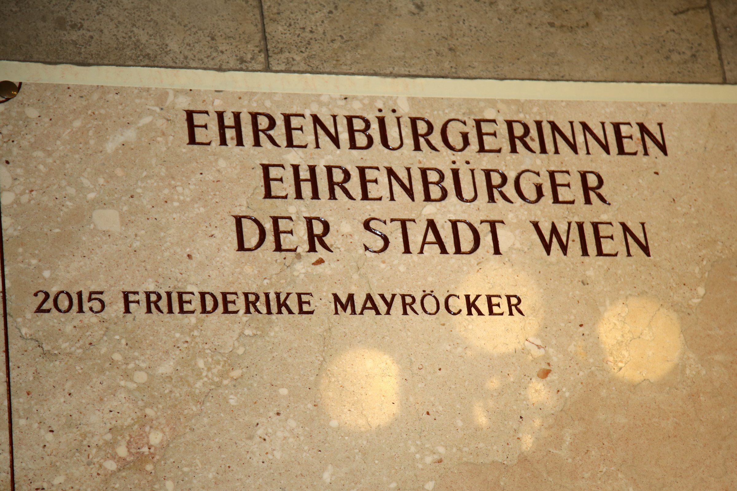 Mayröcker_Friederike-Gedenktafel-5802